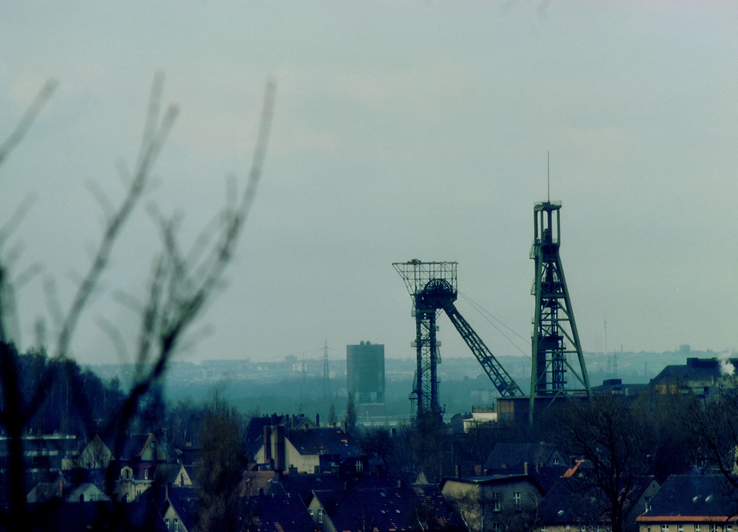 Zeche Mont Cenis Schächte 1 und 3 und im Hintergrund Schacht 6 der verbundenen Zeche Friedrich der Große. Am Horizont der Nordrand des Emschertales. Scan von einem Farbdia, Aufnahme mit einem Teleobjektiv.